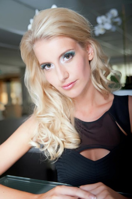 Nederlands model Wendy Kristy Hoogerbrugge